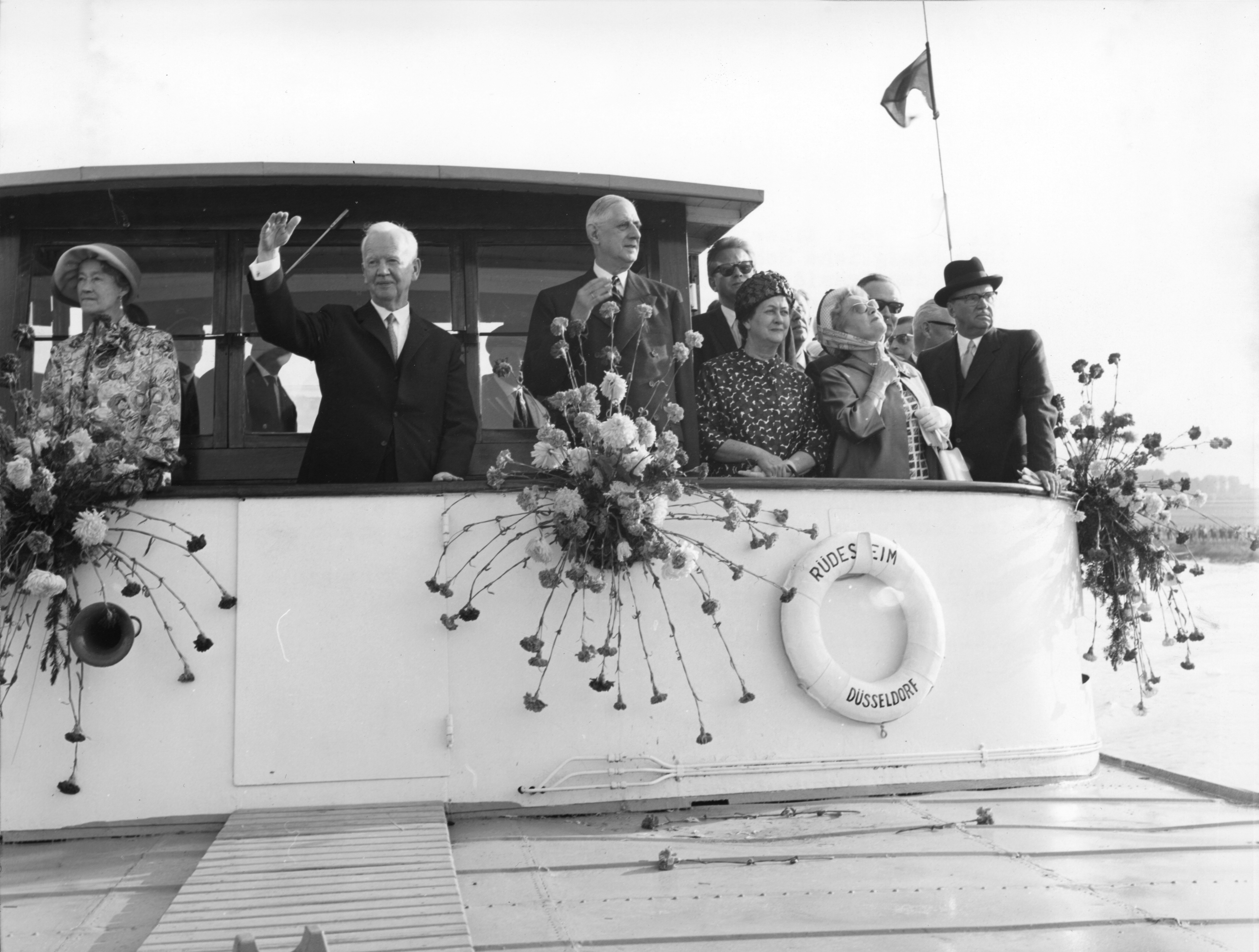 Original caption: "Einweihung des Mosel-Schifffahrtsweges 1964. (Mosel; Staatsoberhäupter; Schleuse Trier) "